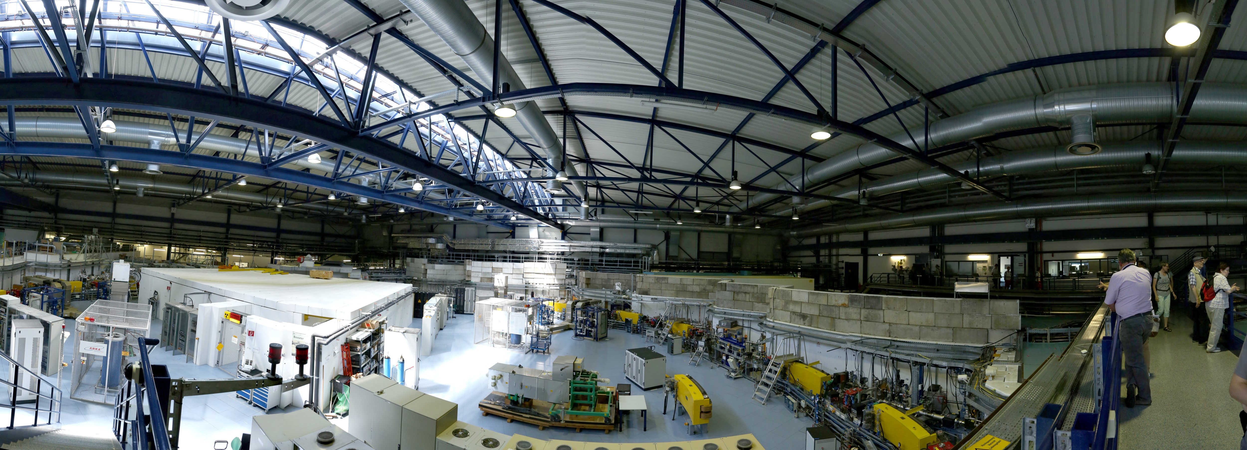 Innere des ANKA Speicherrings